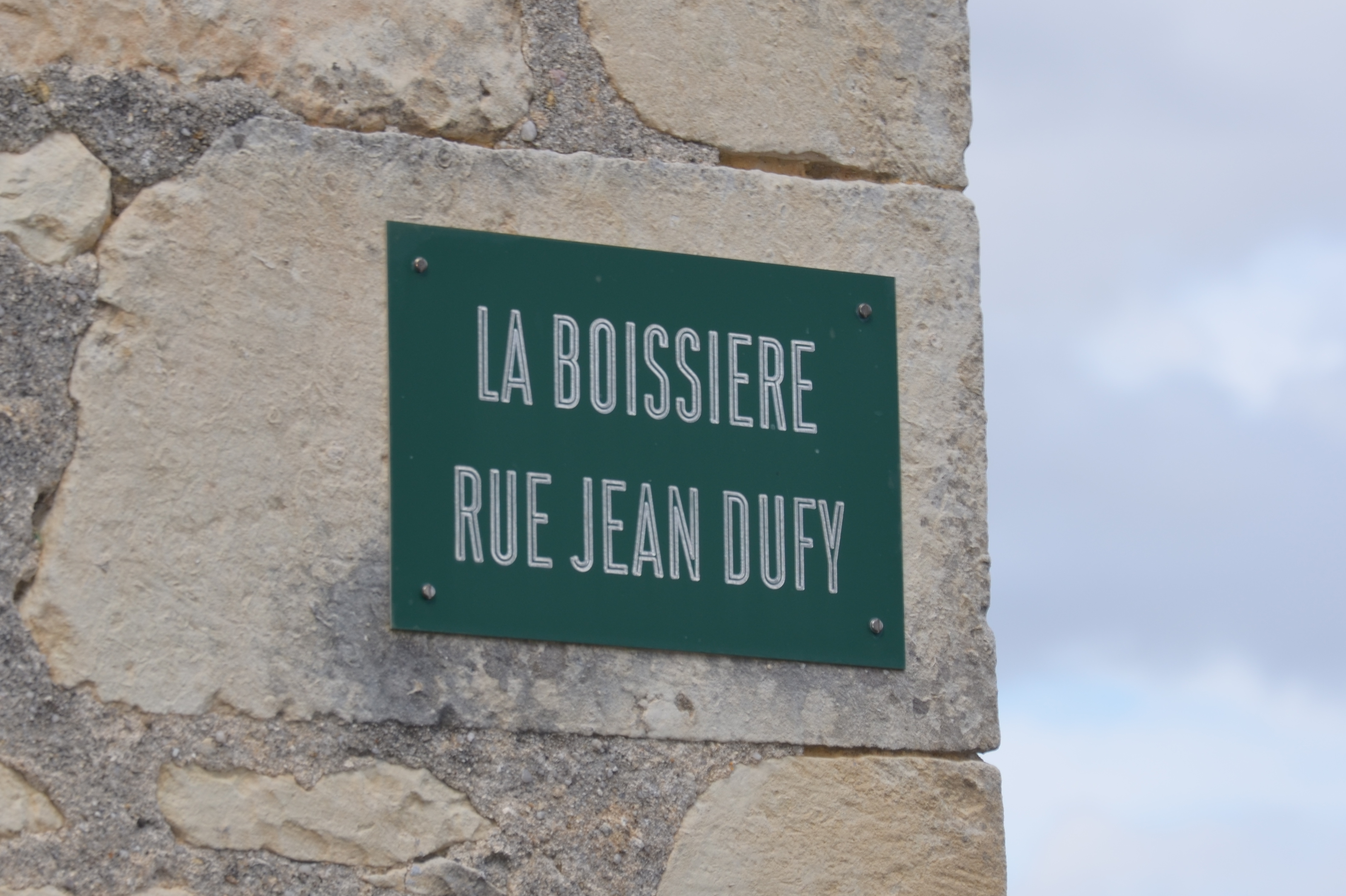 Plaque de la rue Jean Dufy à la Boissière, hameau de Boussay (Indre-et-Loire, France).